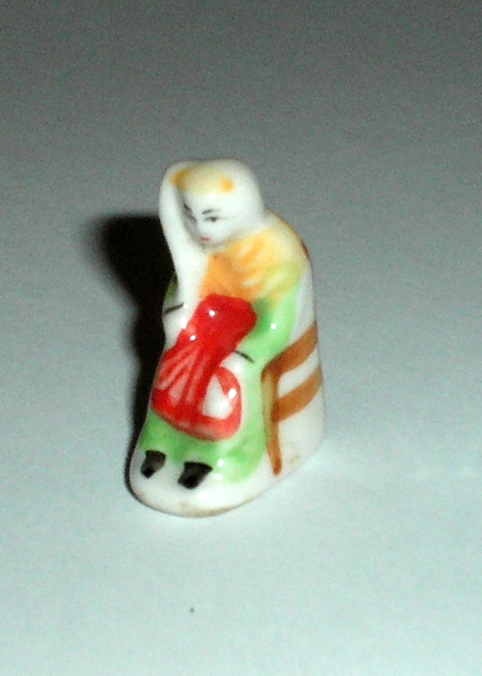 image d'une fève de la galette des rois